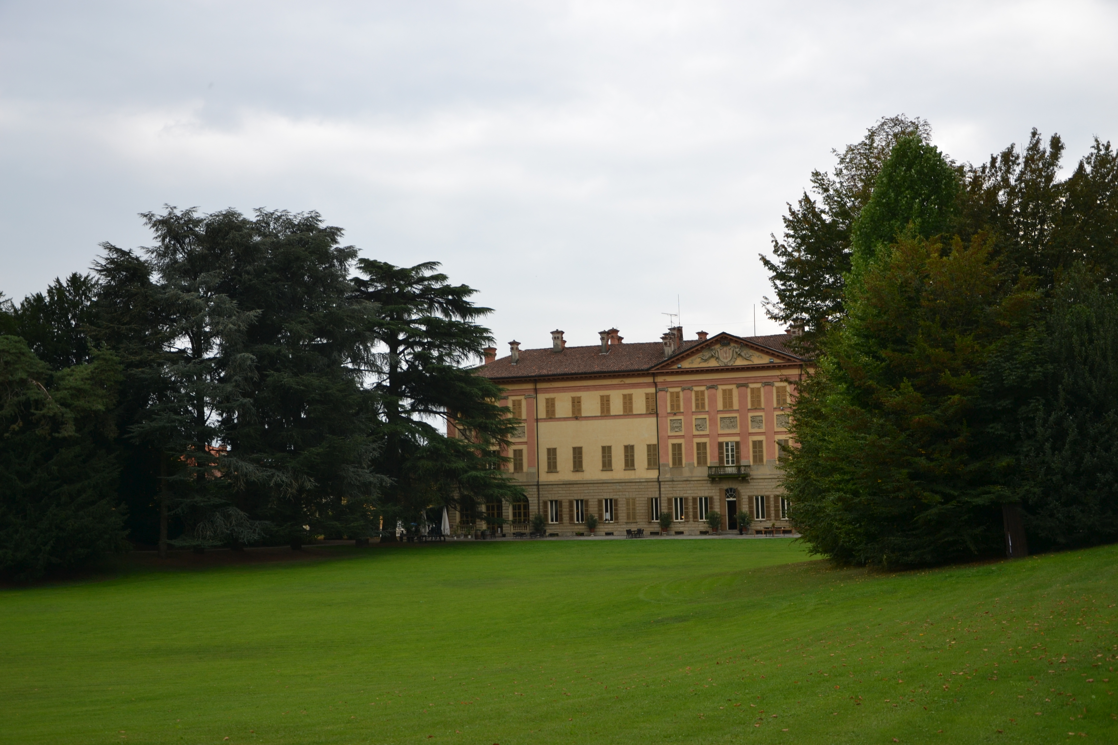 Villa Gallarati Scotti, Oreno di Vimercate (MB) - facciata verso il giardino. Opera di Simone Cantoni (1790)